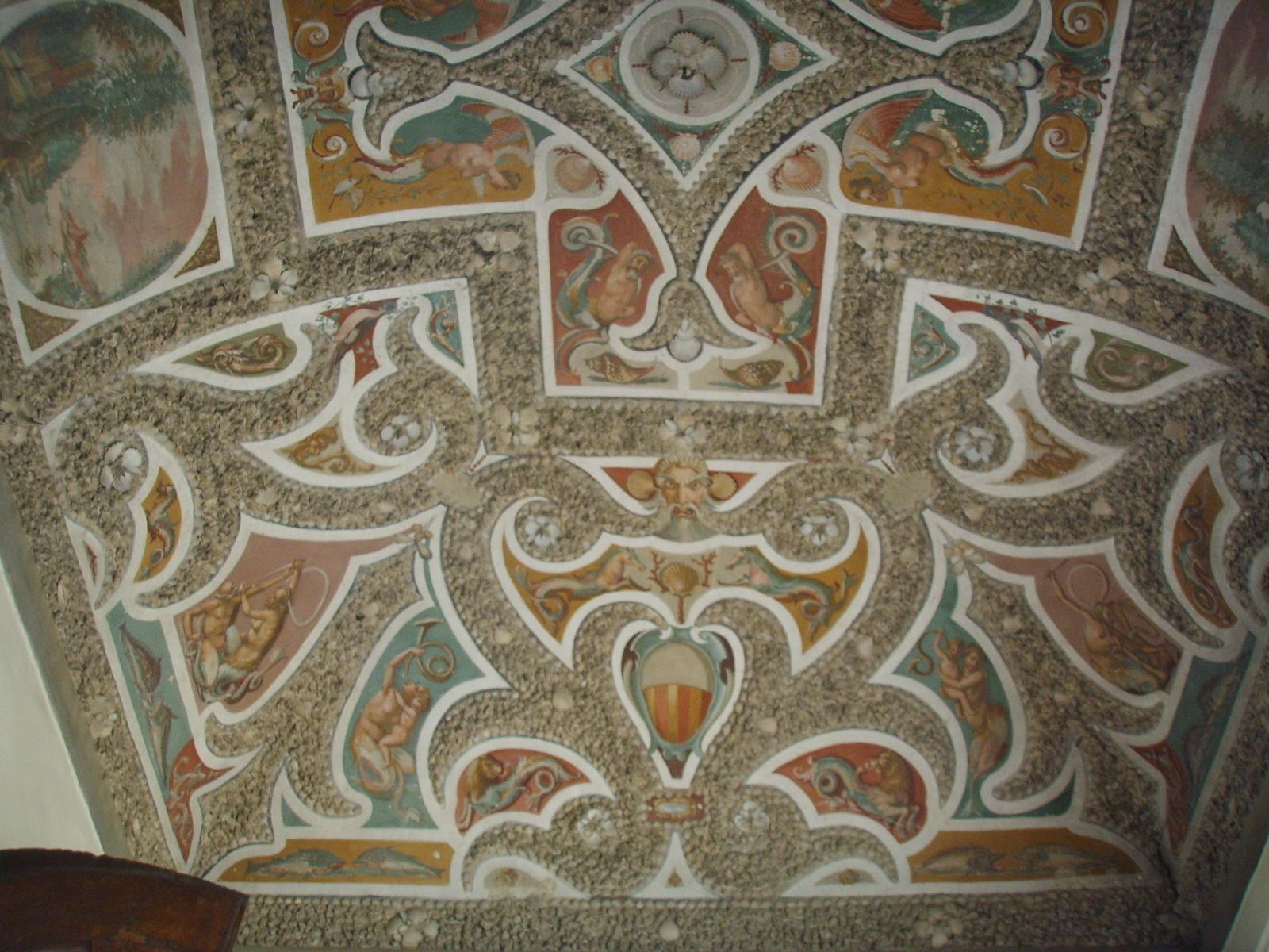 Villa il pozzino soffitto